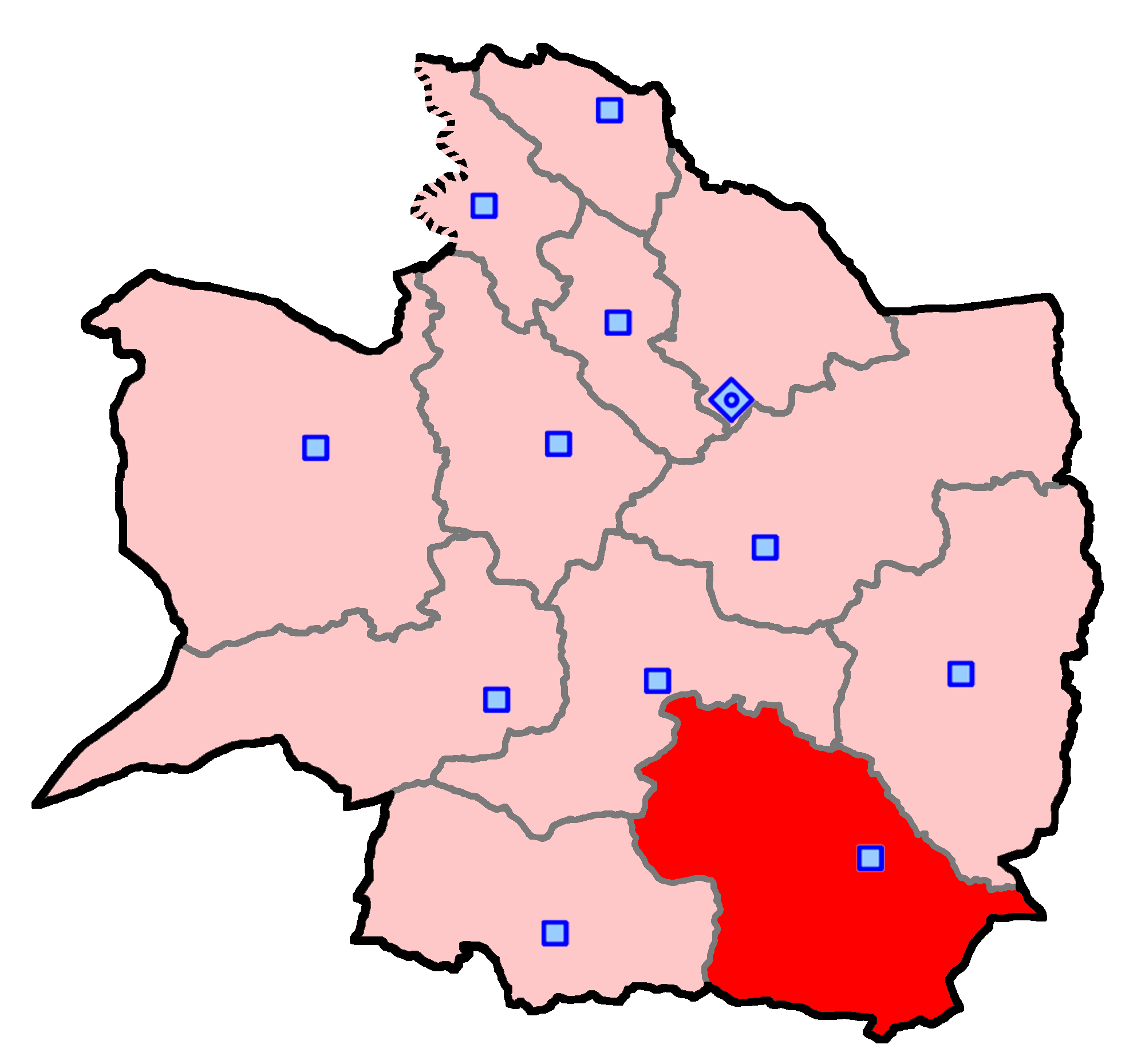 حوزهٔ انتخاباتی خواف برای انتخابات مجلس شورای اسلامی